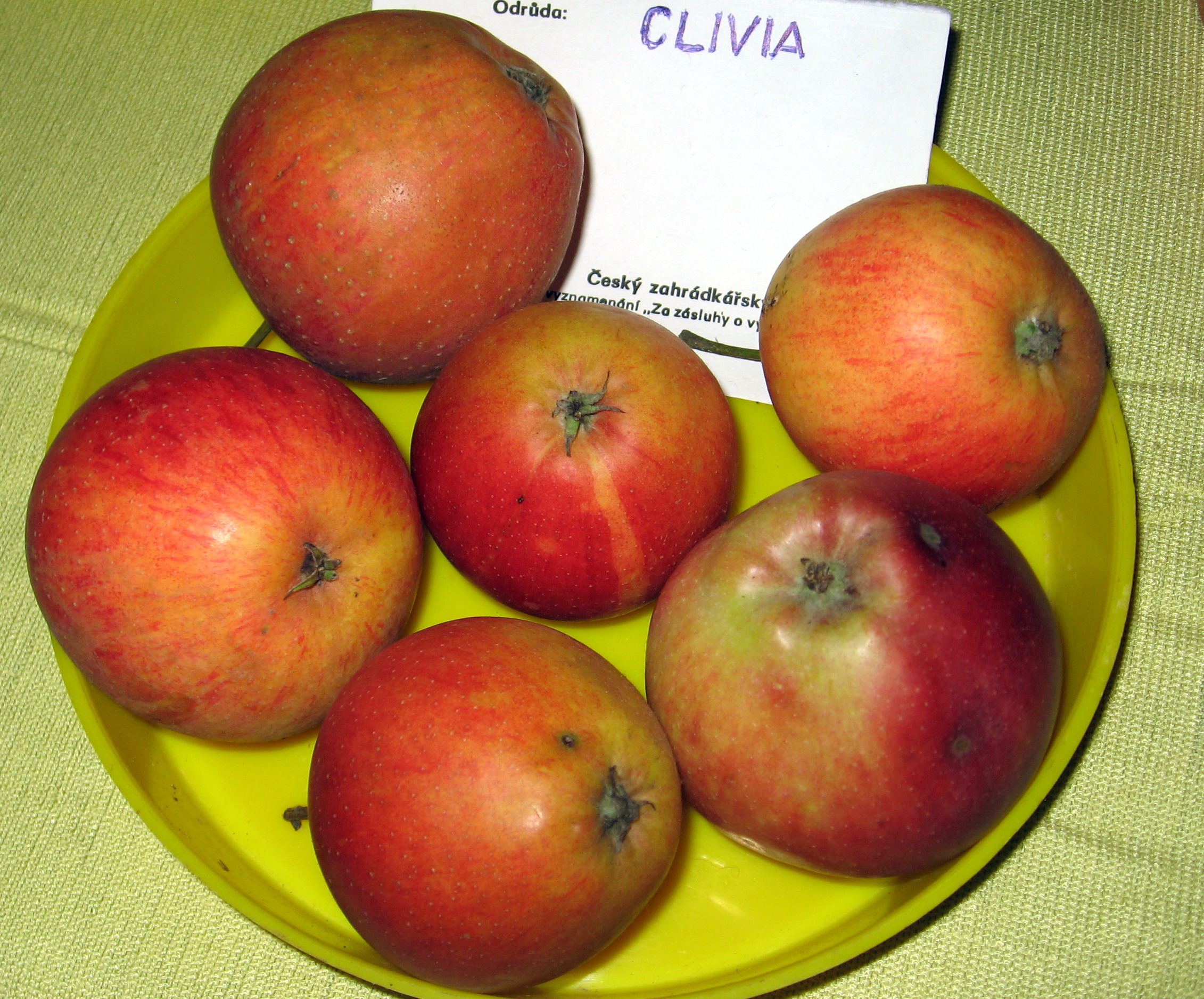 odrůda Clivia